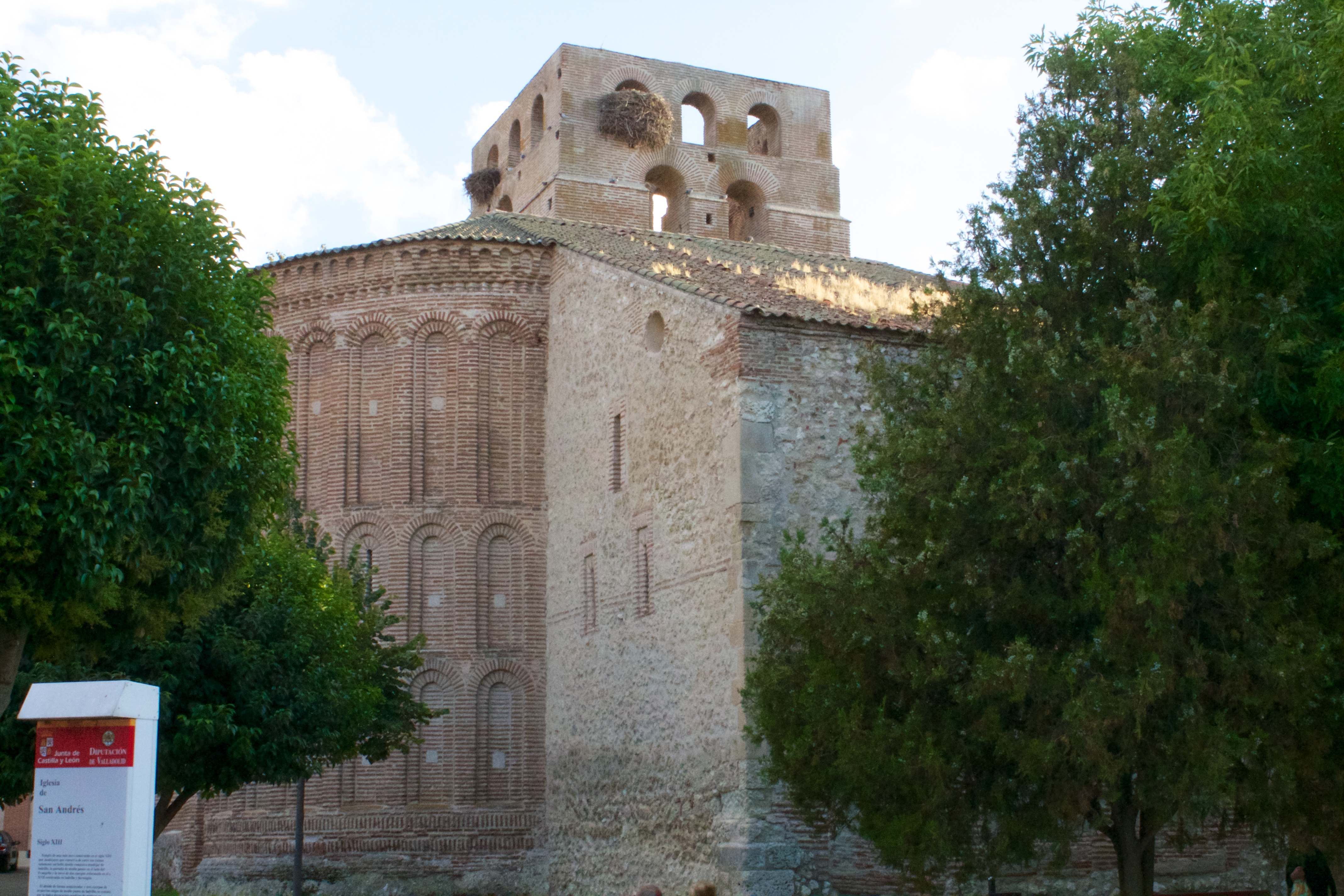 Iglesia del siglo XIII. Ábside románico de ladrillo conformado por tres cuerpos de arcos ciegos. Campanario lateral. El interior se encuentra en ruina, permitiendo el disfrute de los elementos estructurales del interior.